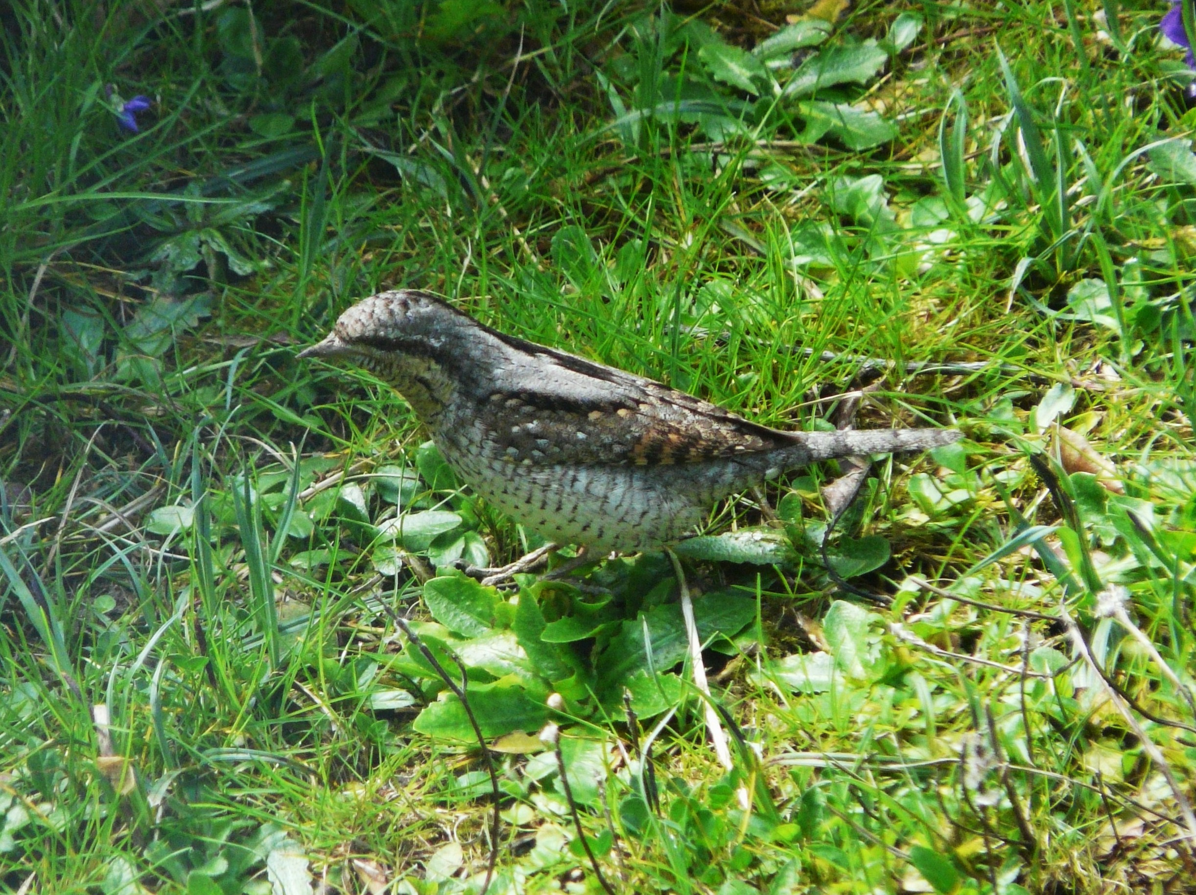 Torcol fourmilier (Jynx torquilla)